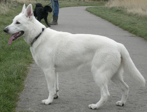 eigen gemaakte foto